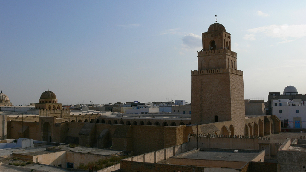 Okba Ibn Nafi Mosque, Kairouan, Tunisia.